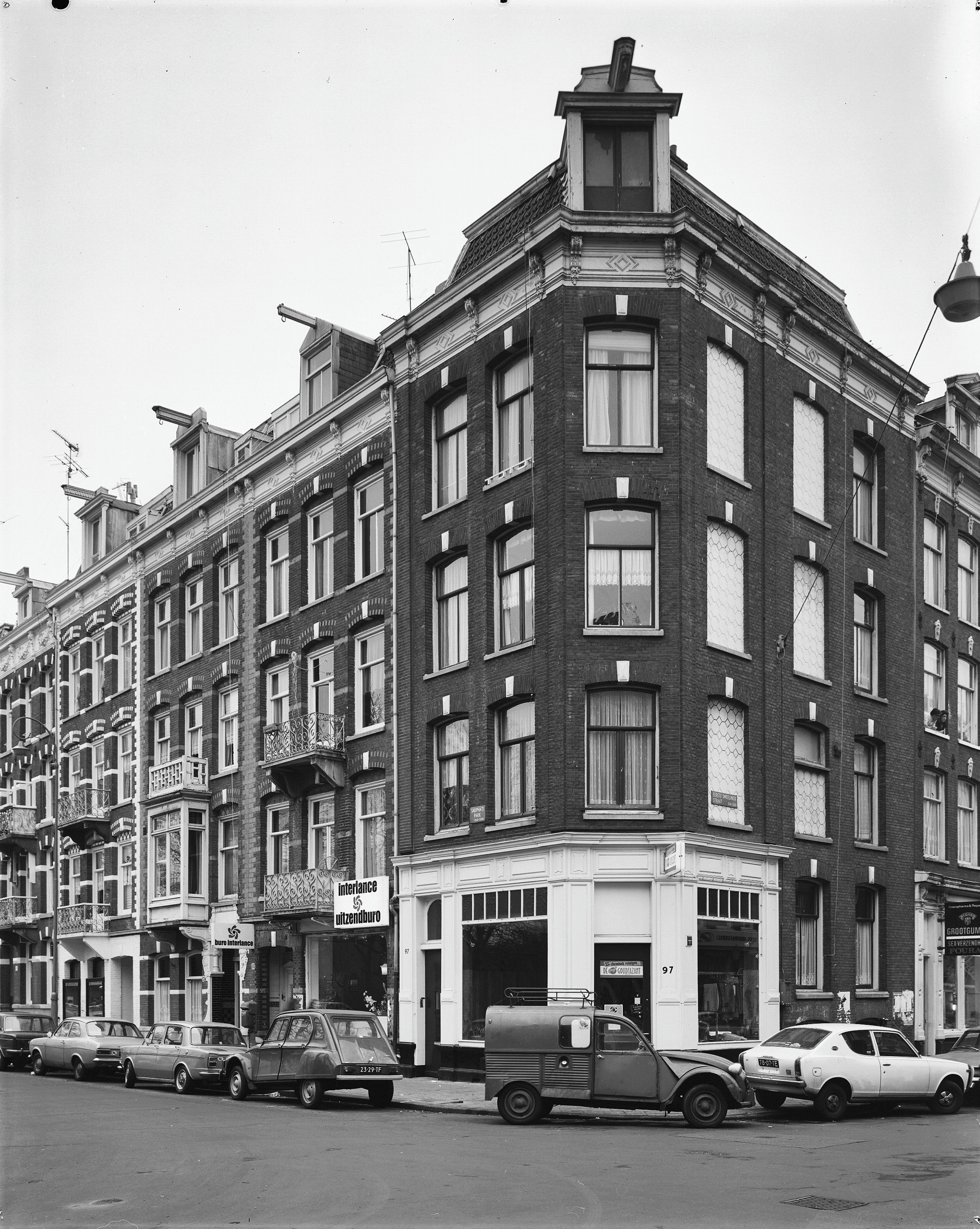 overzicht